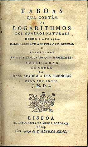 Taboas que contém os logarithmos